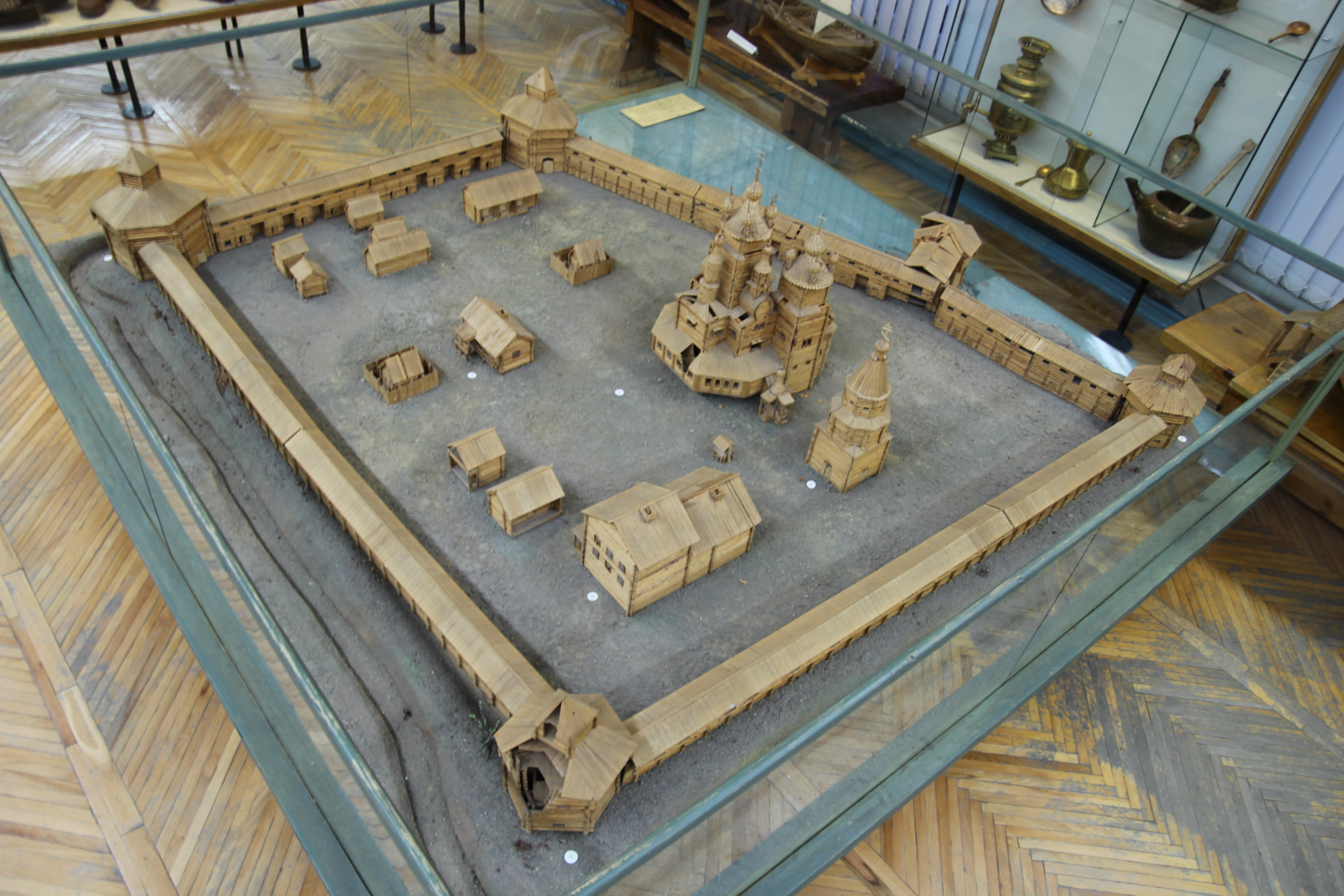 Кольский острог 3